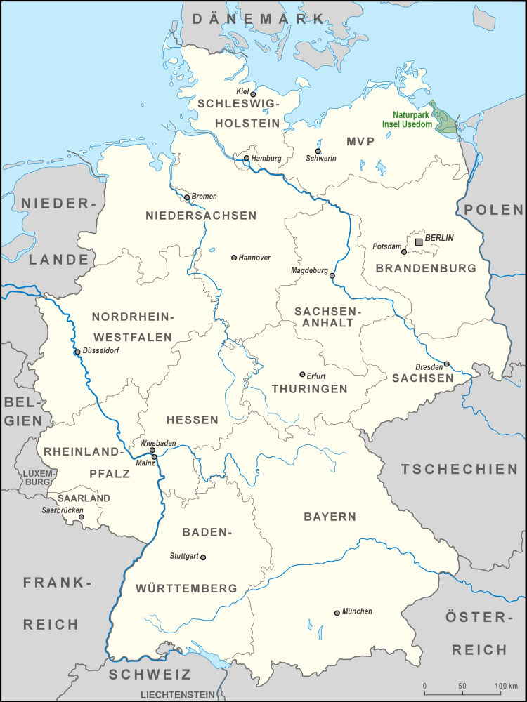 Karte des Naturparks Insel Usedom in Deutschland